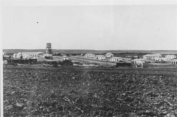 מראה בארות יצחק בנגב